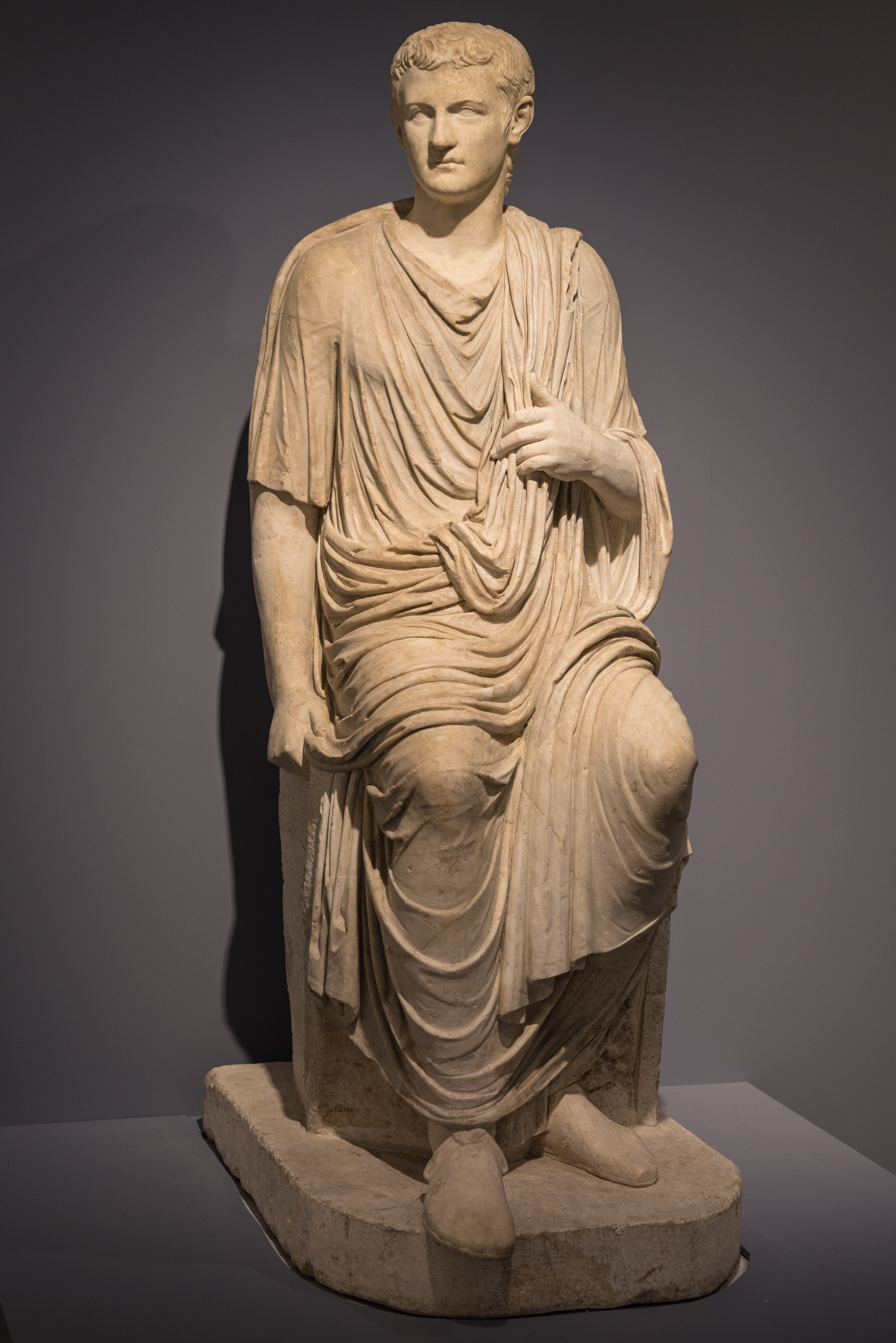 Claude, un empereur au destin singulier - Exposition au musée des Beaux-Arts de Lyon - 2018